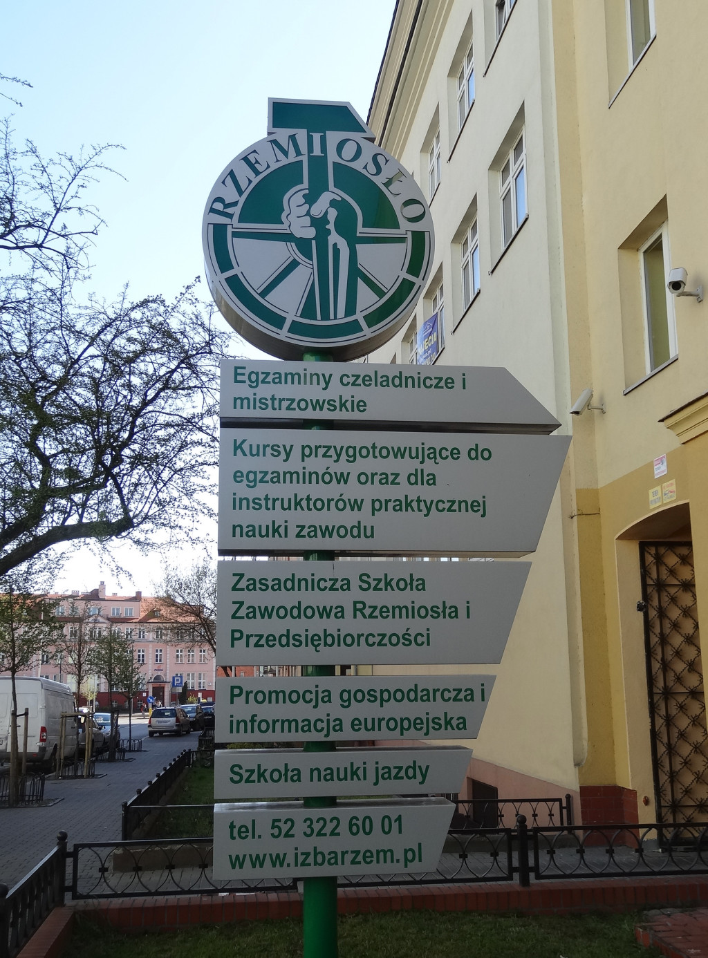 Bydgoski Dom Rzemiosła przy ul. Maksymiliana Piotrowskiego 11, gdzie siedzibę ma m.in. Kujawsko-Pomorska Izba Rzemiosła i Przedsiębiorczości i Kujawsko-Pomorski Fundusz Pożyczkowy